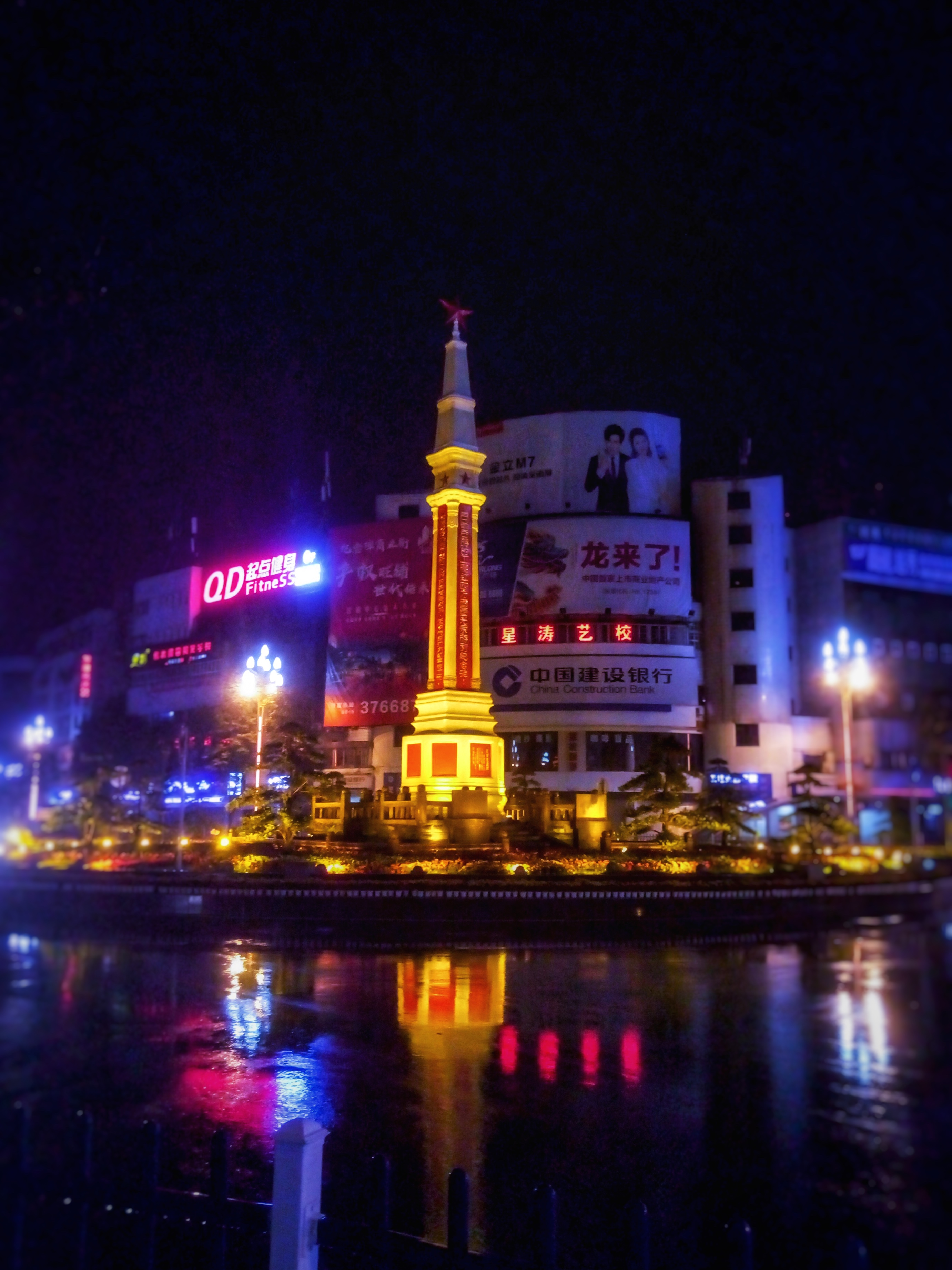 运用魅蓝3S在晚间拍摄，使用了lightroom和snapseed处理。